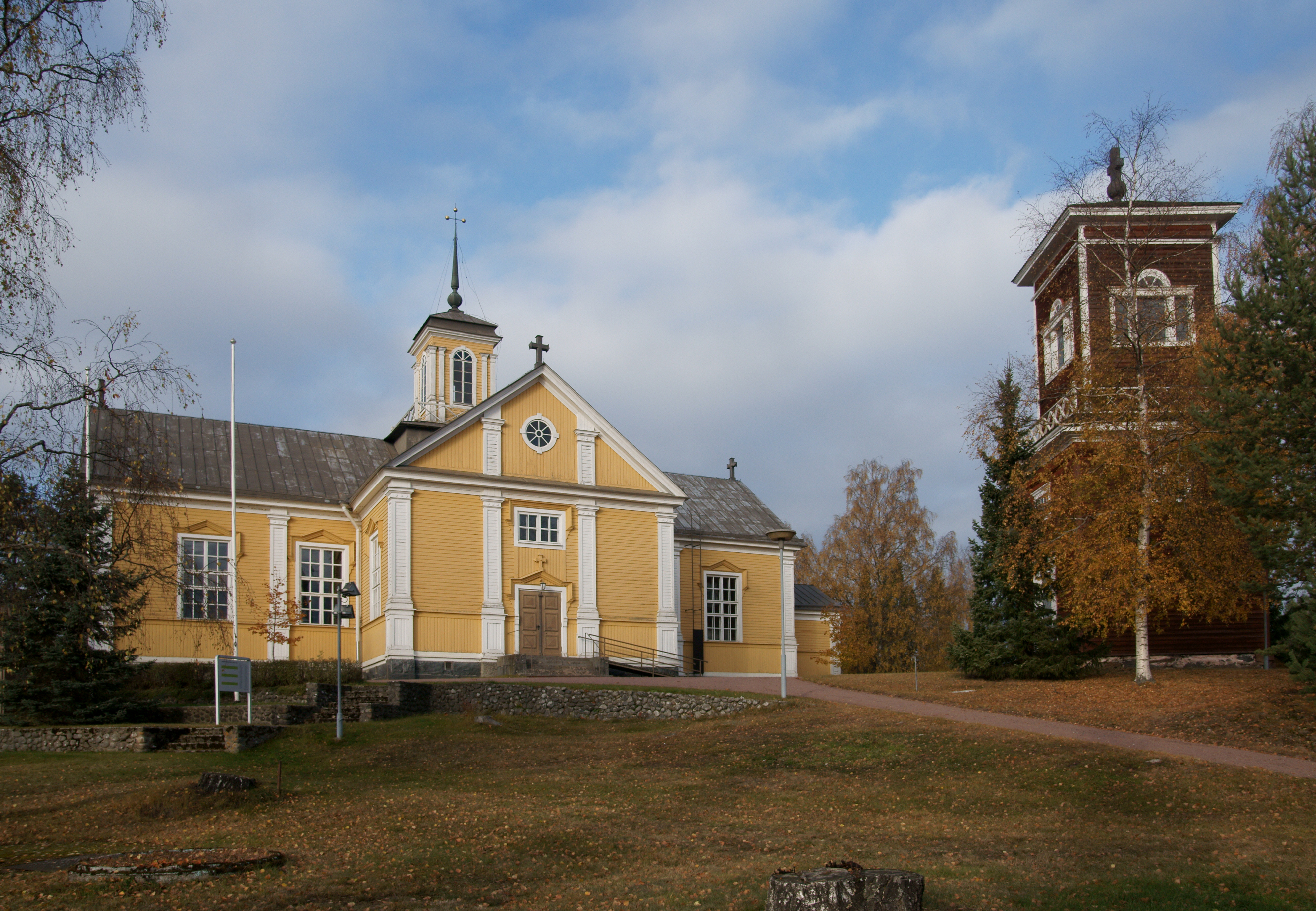 Ahlaisten kirkko.